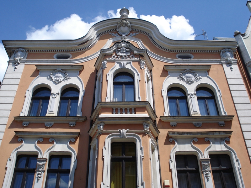 Inowrocław - kamienica